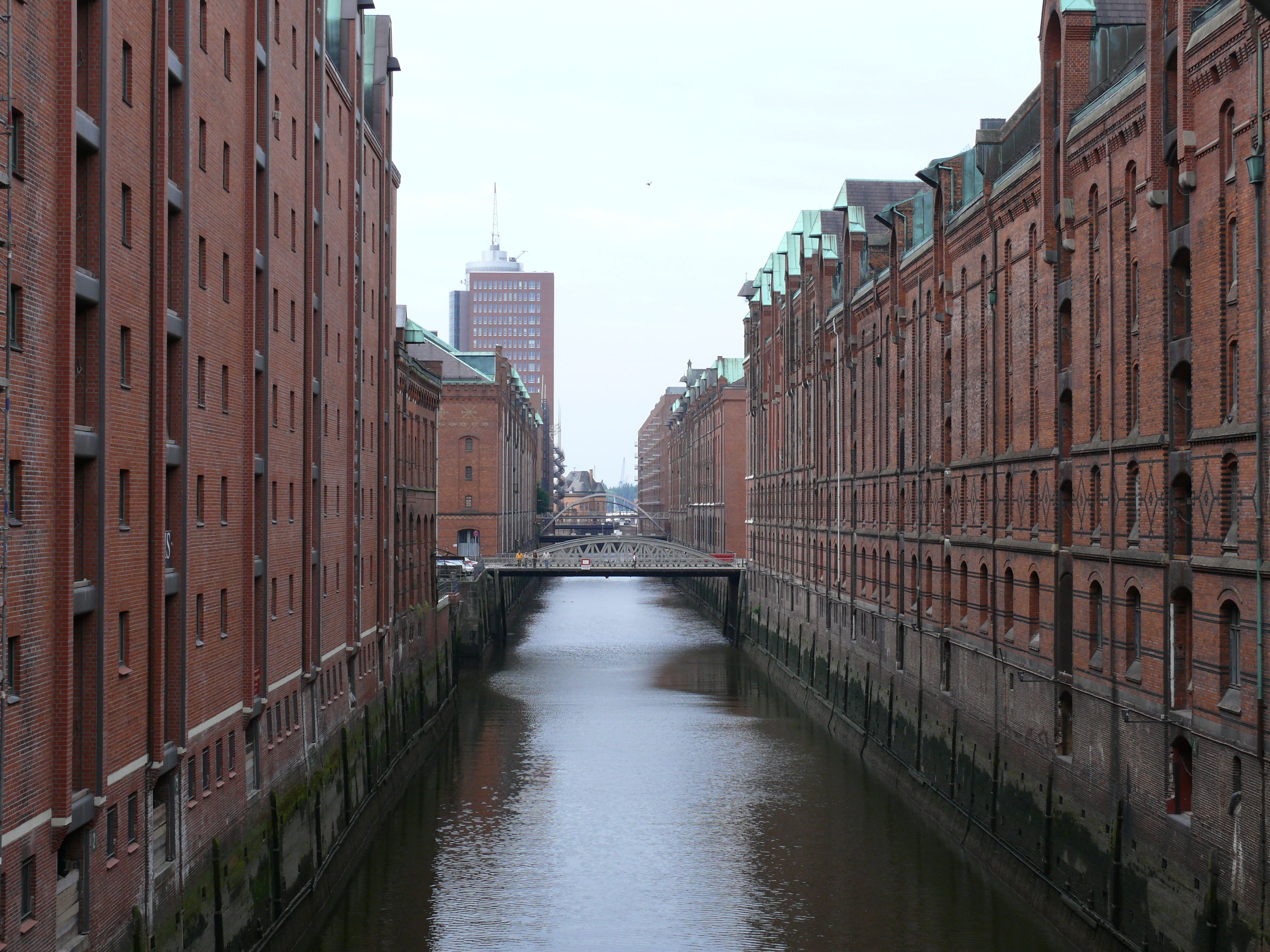 Hamburg, Brooksfleet in der Speicherstadt, 2007This is a photograph of an architectural monument.